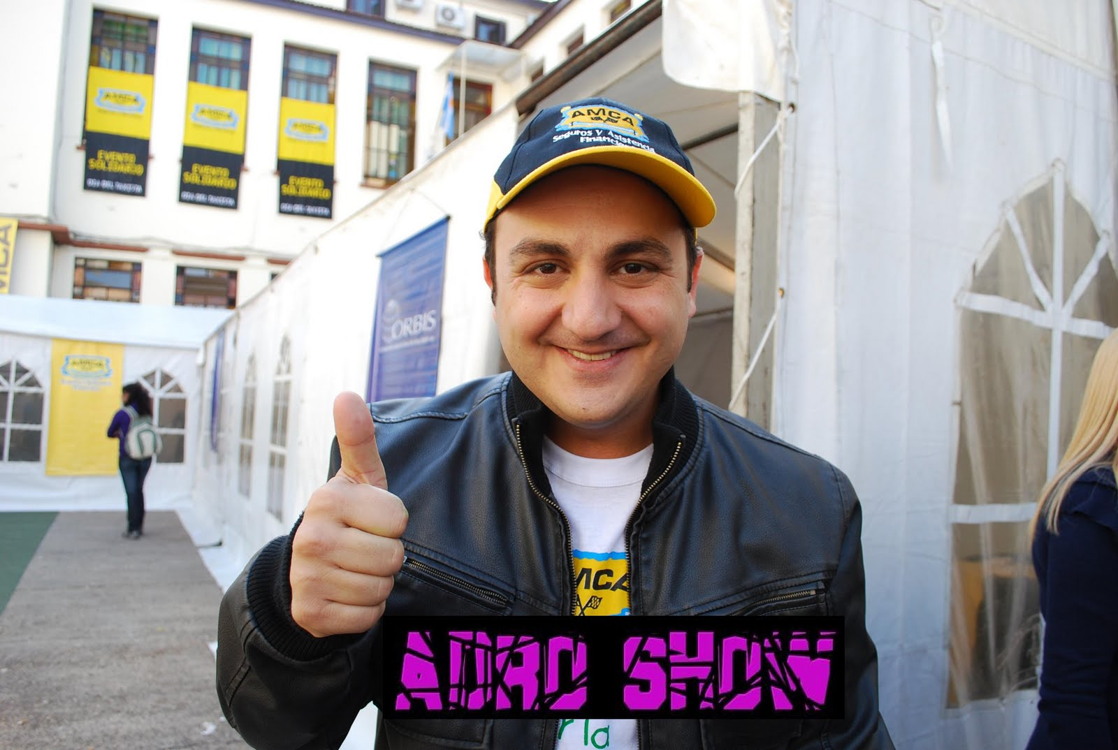 Es un cantante y productor infantil etc